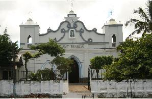 Iglesia de Concepcion de Ataco.2009